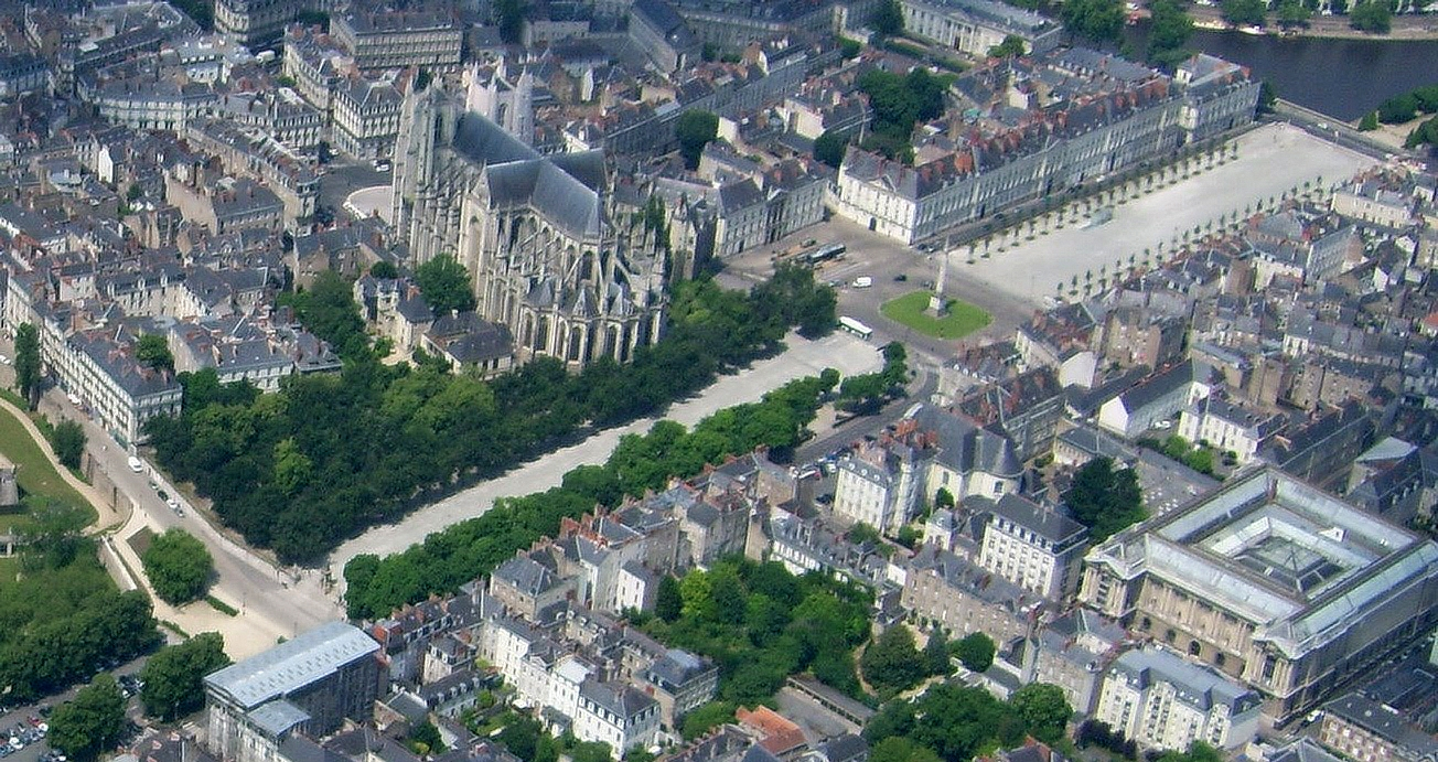 Vue aérienne des cours Saint-Pierre et Saint-André de Nantes, séparés par la place Joffre. La cathédrale Saint-Pierre jouxte le cours Saint-Pierre. On distingue l'Erdre au bout du cours Saint-André. (Nantes, France)